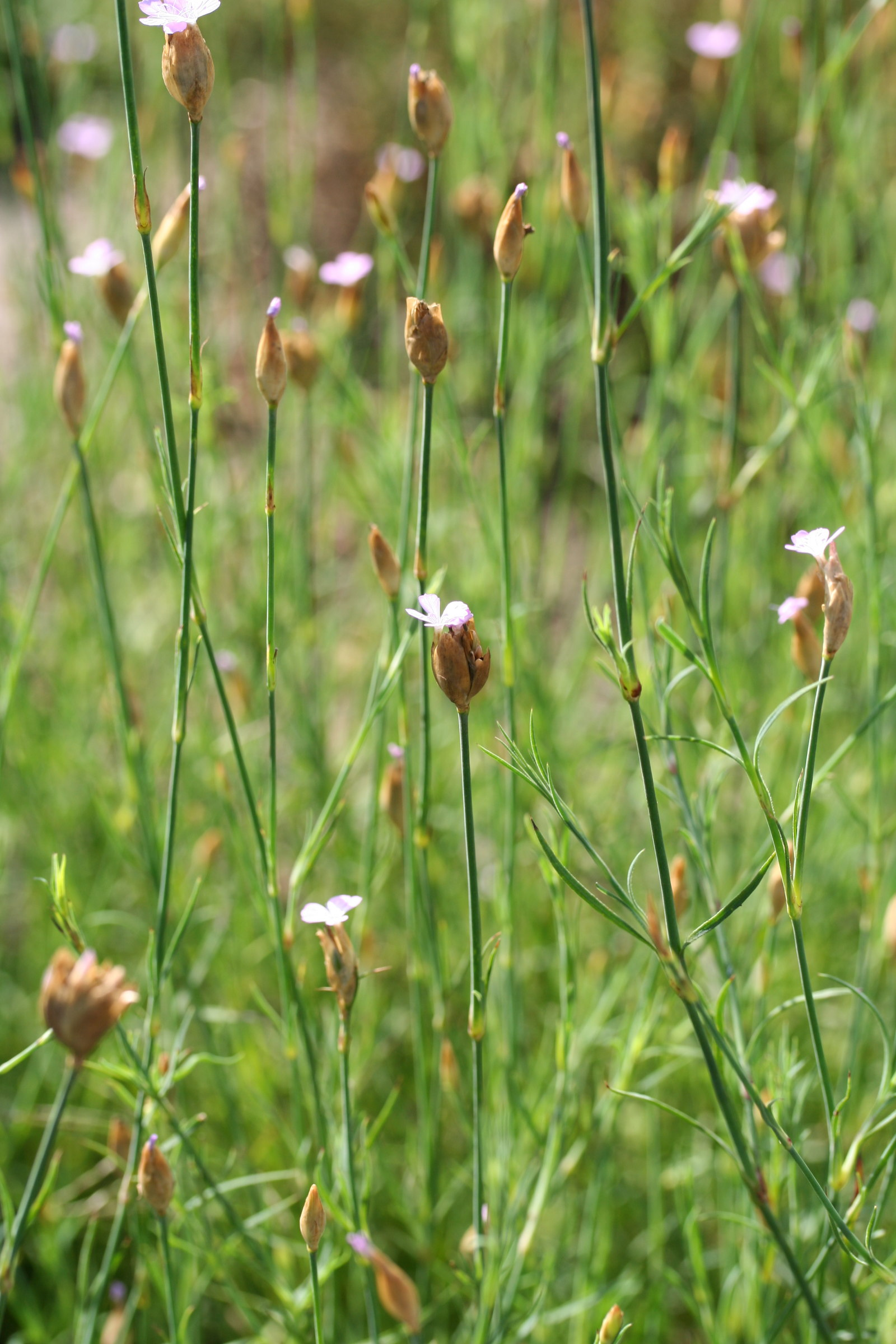 Petrorhagia prolifera im Botanischen Garten Dresden